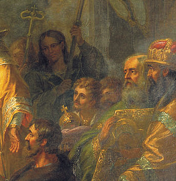 В.И. Бахтеяров-Ростовский с державой (фрагмент картины Г. Угрюмова «Призвание М.Ф. Романова на царство 14 марта 1613 года».